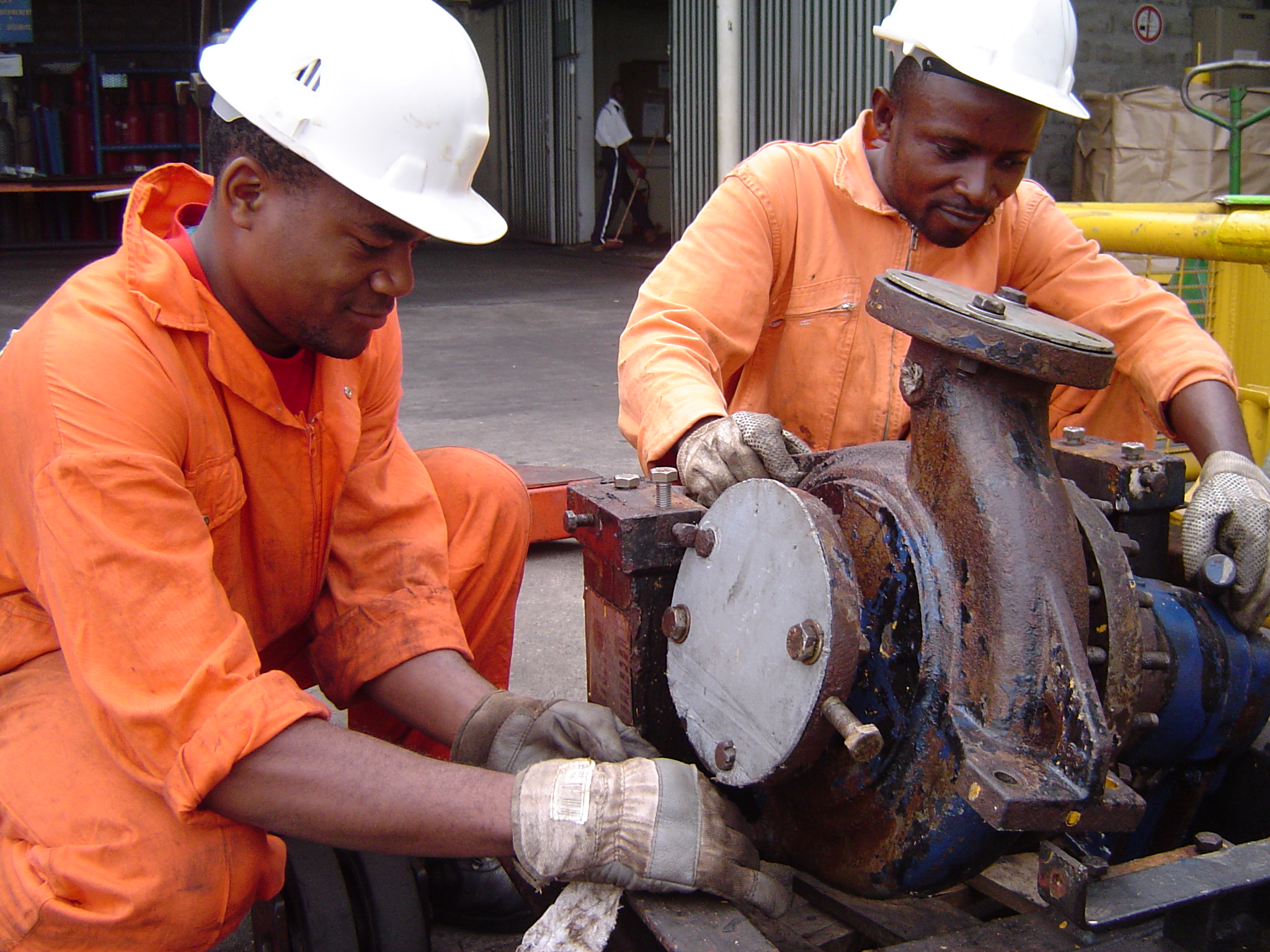 en entreprise